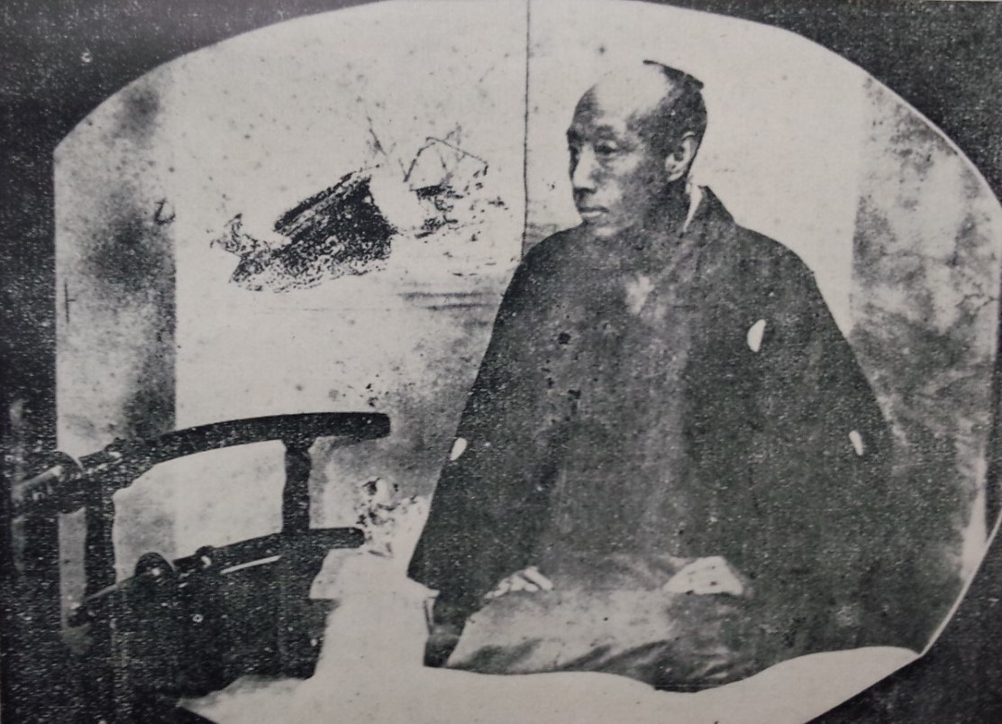 本多忠民の肖像写真。